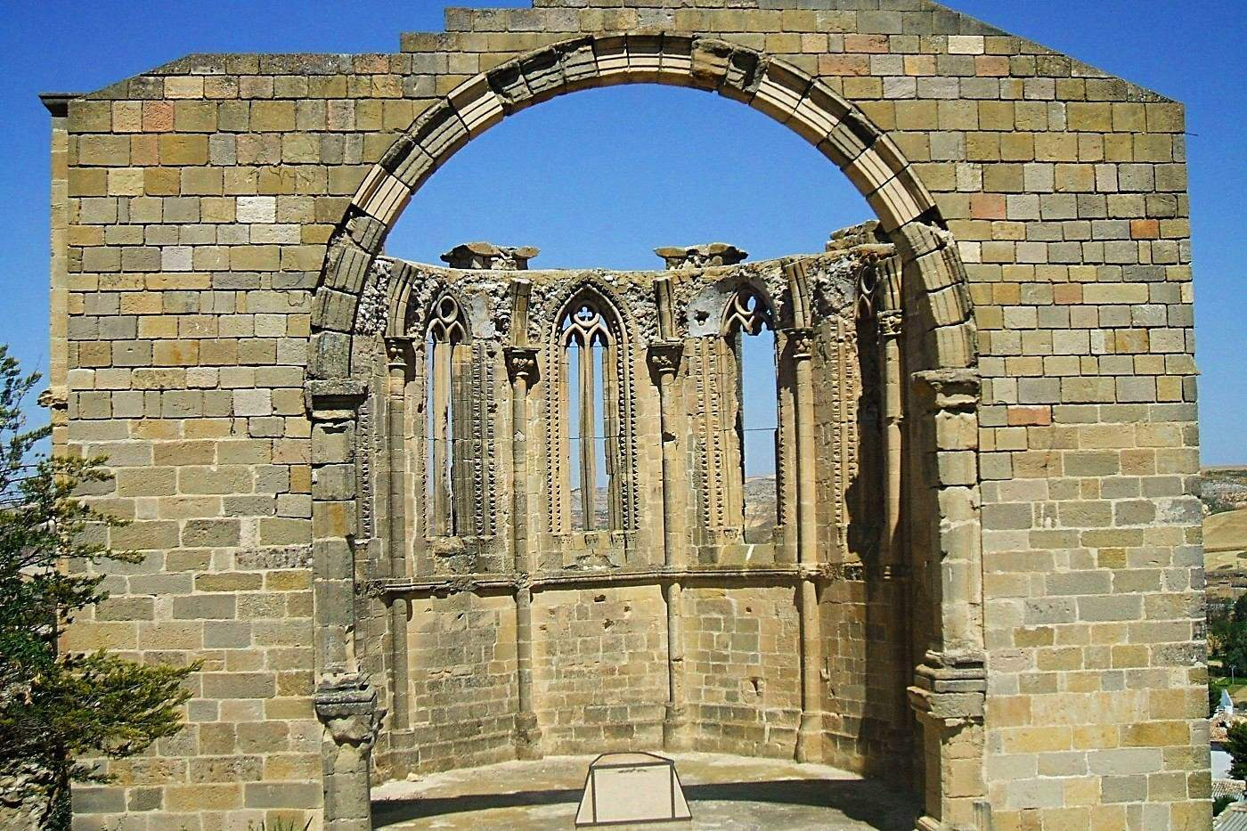 Huete - Iglesia de Santa Maria de Atienza